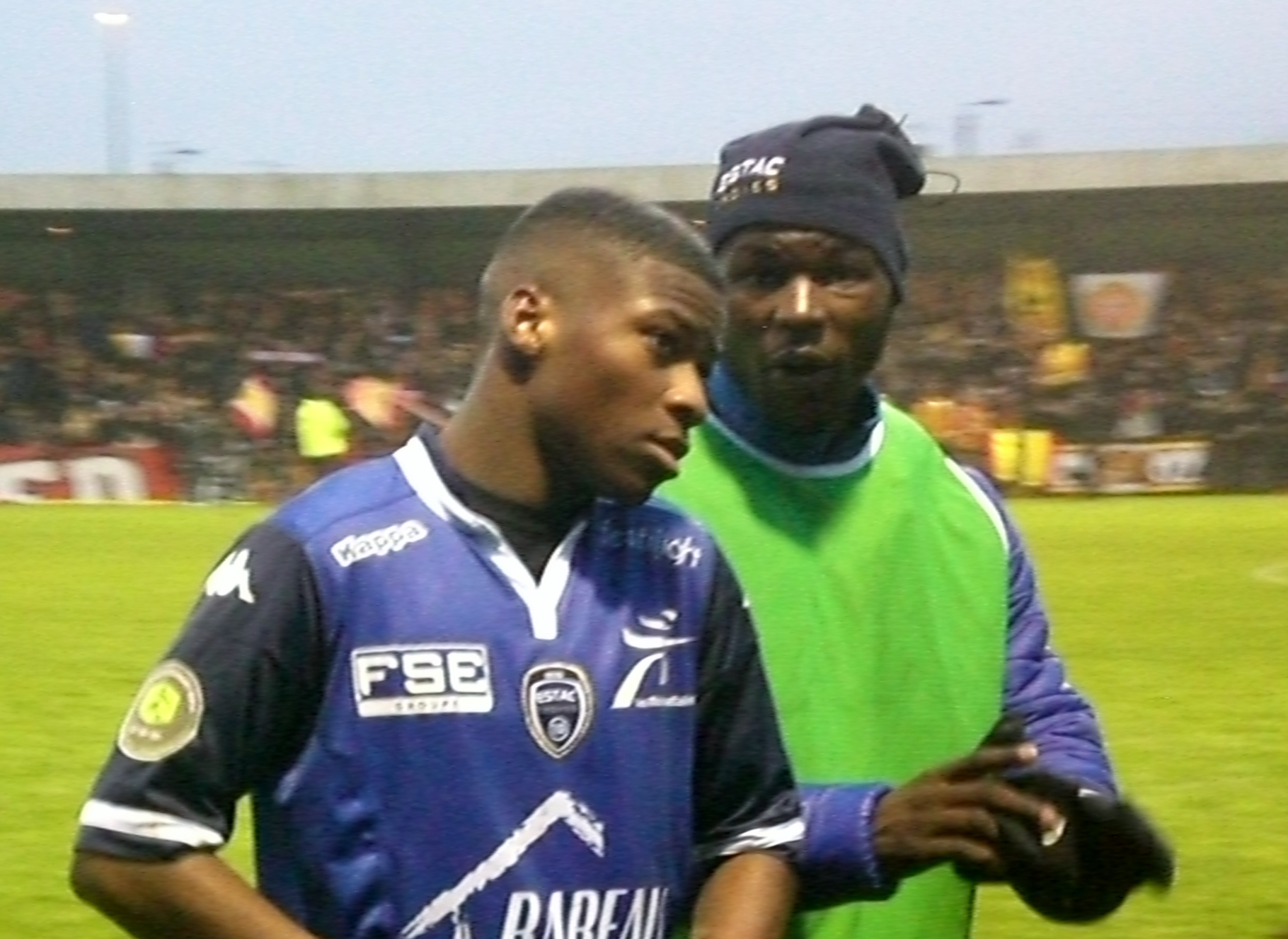 Abdel Hakim Abdallah (à gauche) lors du match RC Lens B / ES Troyes B, comptant pour la dix-huitième journée du Championnat de France de football amateur (CFA), le13 février 2016, au Stade François Blin d'Avion.